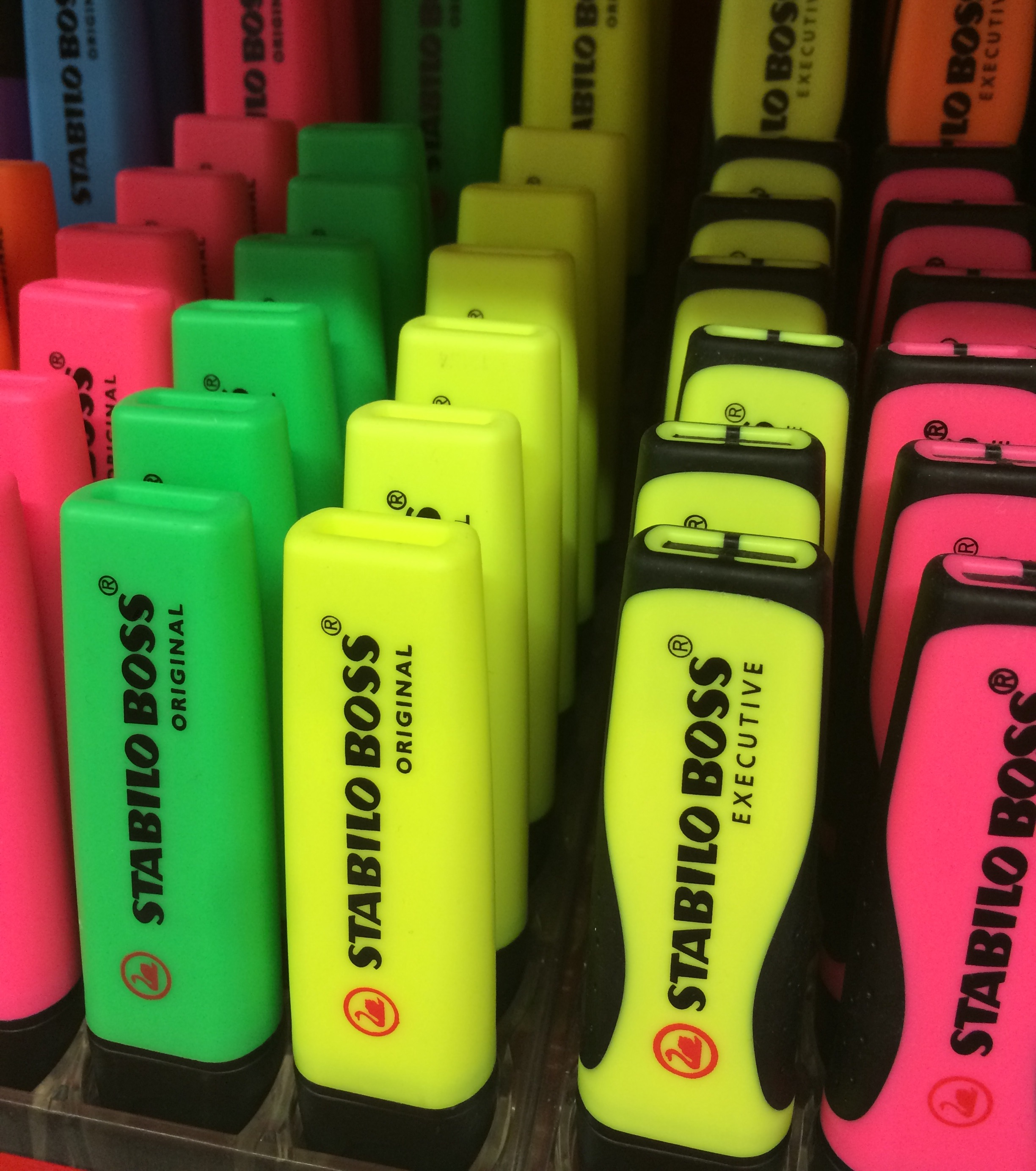 Stabilo Textmarker